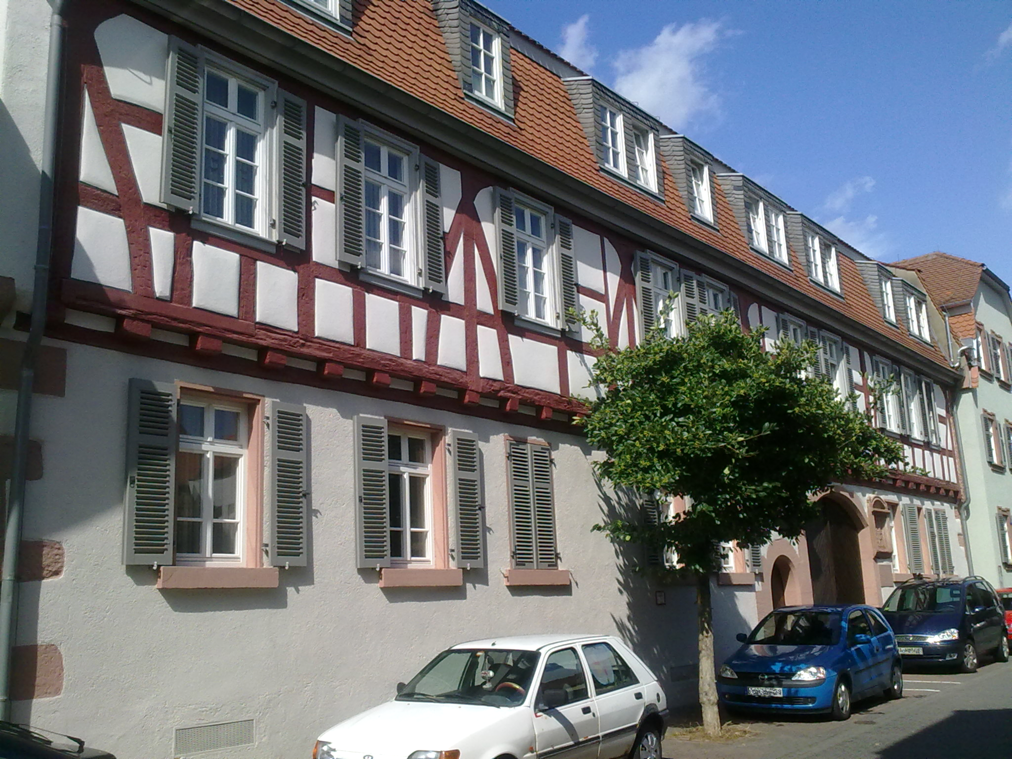 Das Hauptgebäude (Straßenfront) des Rodensteiner Schlosses in Groß-Umstadt. Rechts angedeutet (grünes Haus) standen von 1598 bis 1980 die ehemaligen Rodensteiner Bürgerhäuser, die, Teil des ehemaligen Schlossareals, abgerissen wurden und von denen nur Stilelemente in den Neubau übernommen wurden.